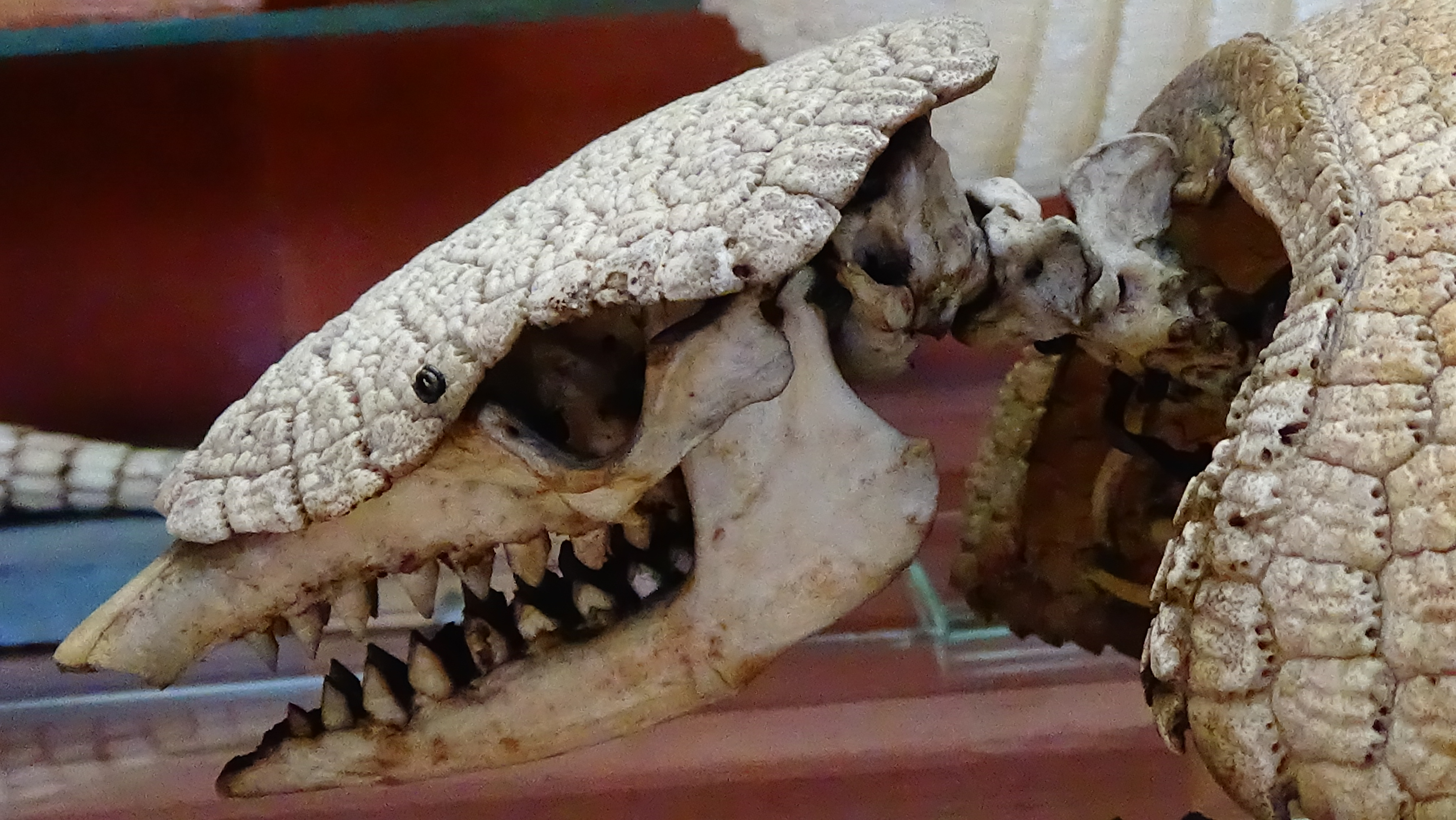 Chaetophractus villosus Grand tatou velu - squeletteMNHN